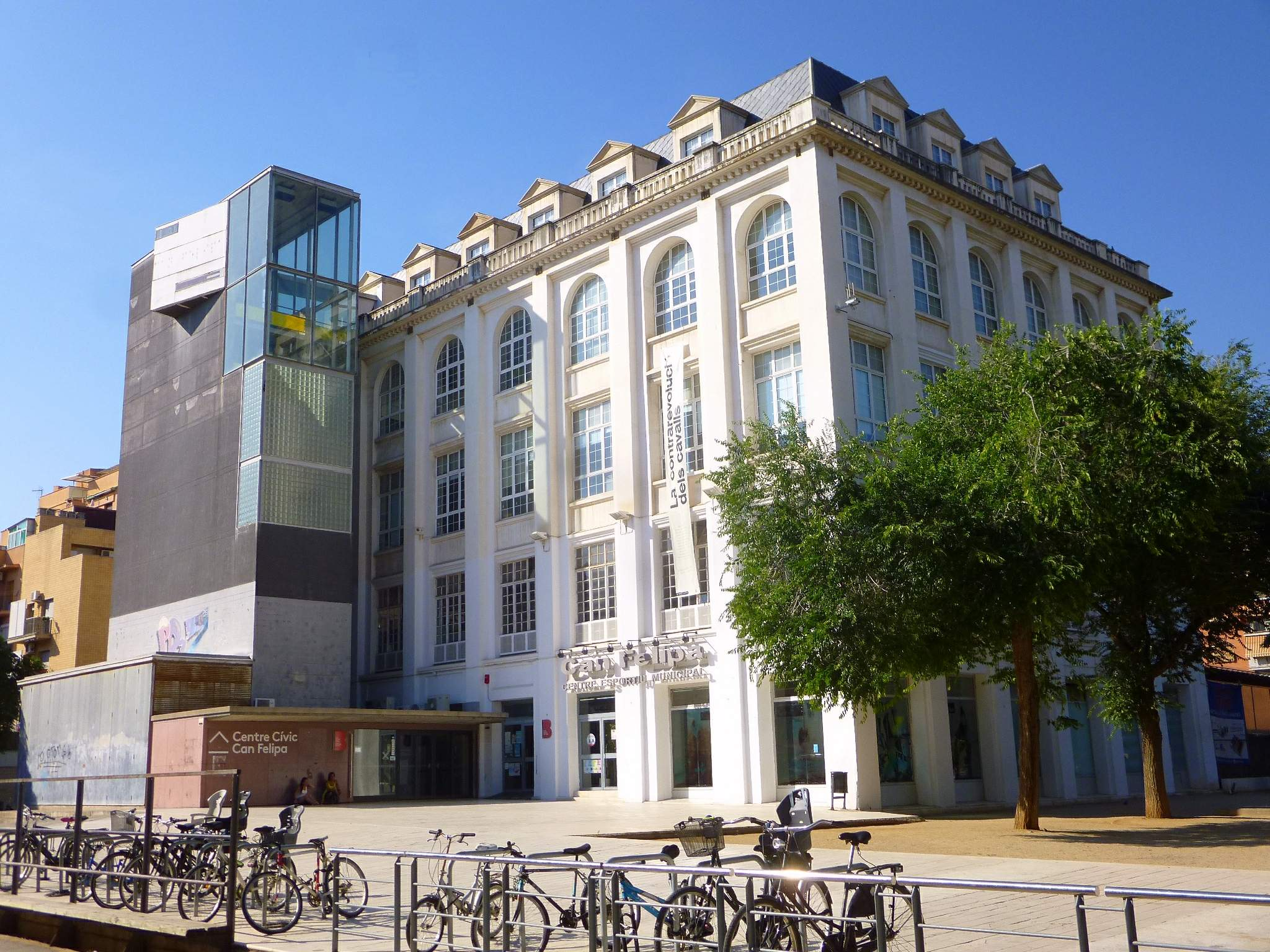 Barcelona - Centre Cívic Can Felipa